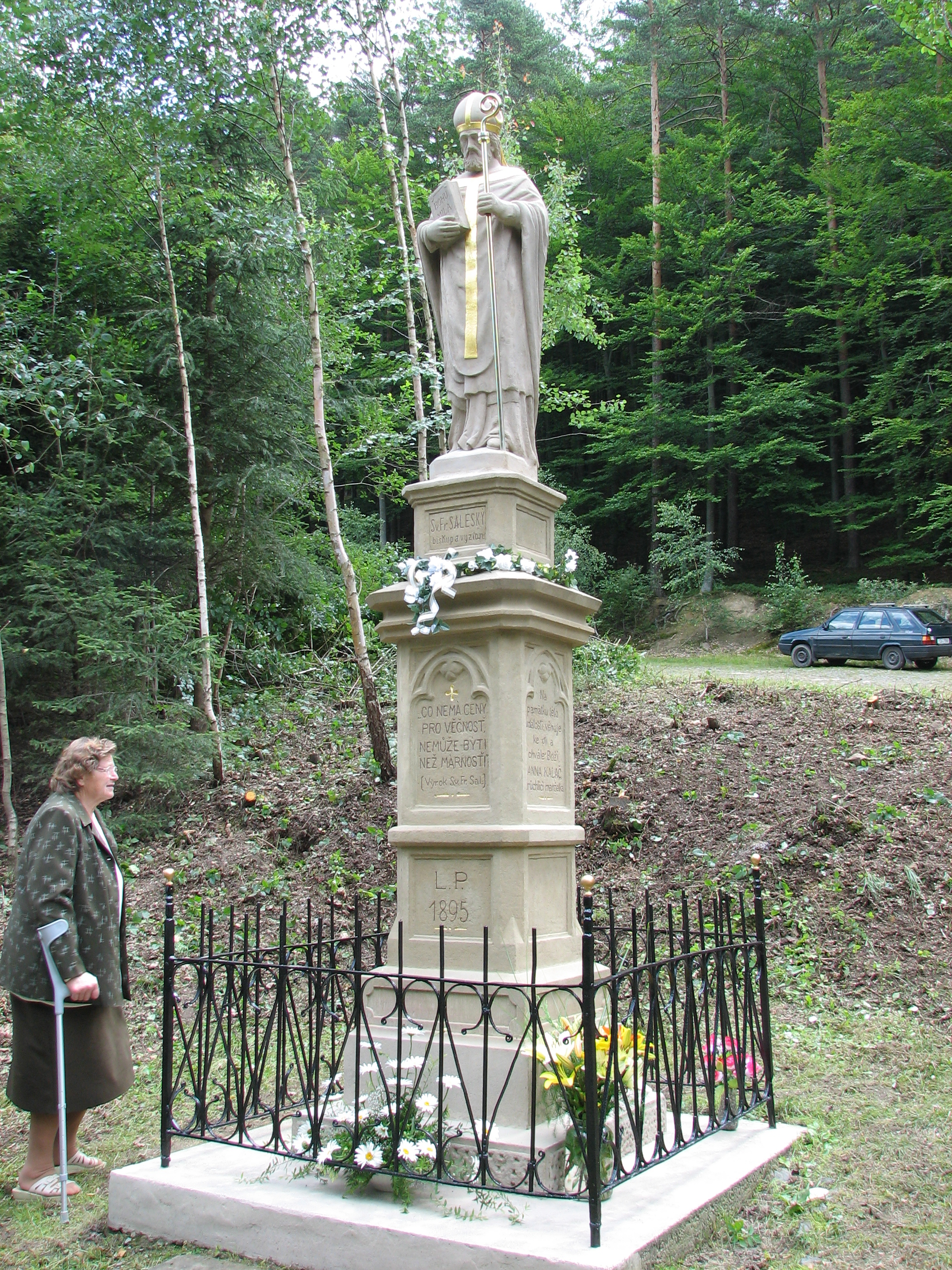 Socha svatého Františka Saleského 1 km od kostela na Malenisku